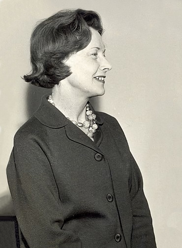 Mme Barbara Castle alors Ministre du développement outre-mer, alors qu'elle rencontre le ministre des finances du Malawi, Mr John Tembo.